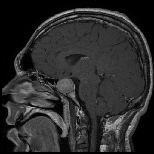 Tumeur hypophysaire